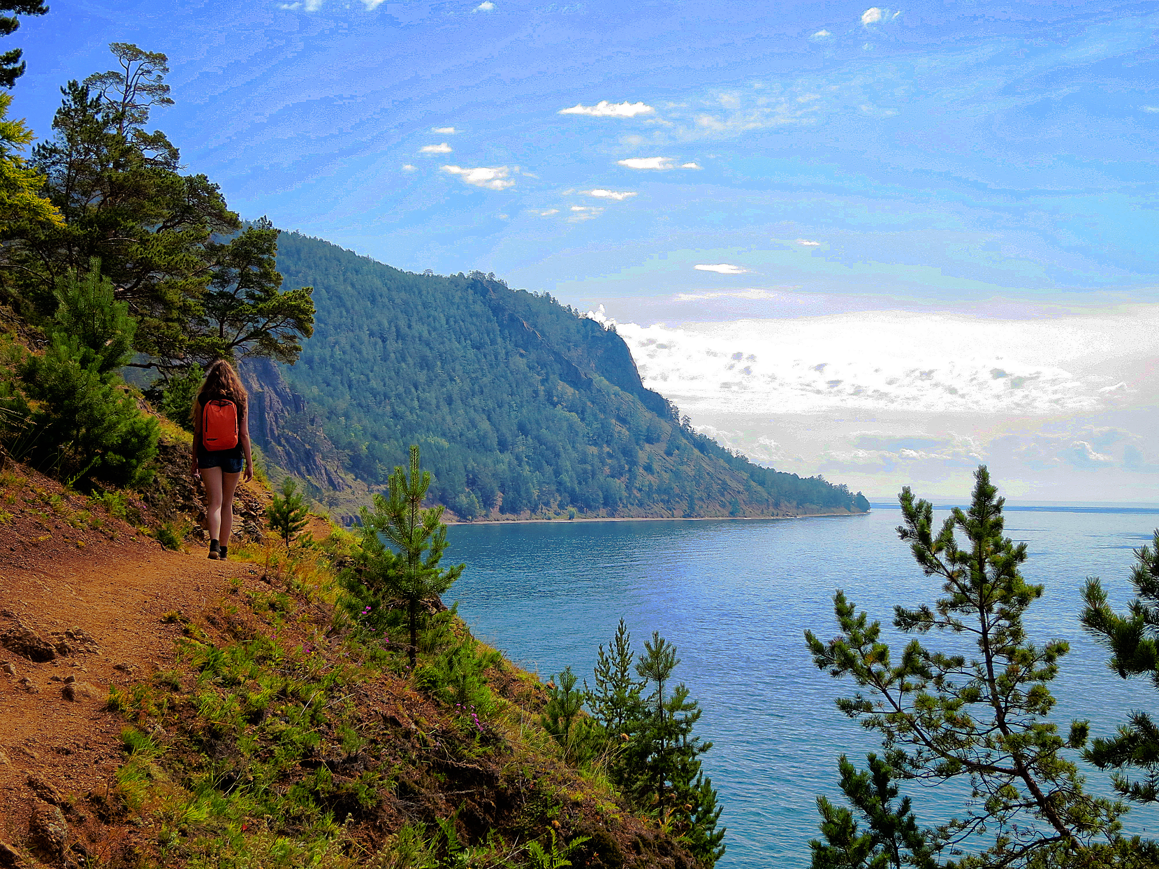 Побережье Байкала: На побережье оз. Байкал,Кабанский район, Бурятия This image is related to the protected area of Russia number 0310044